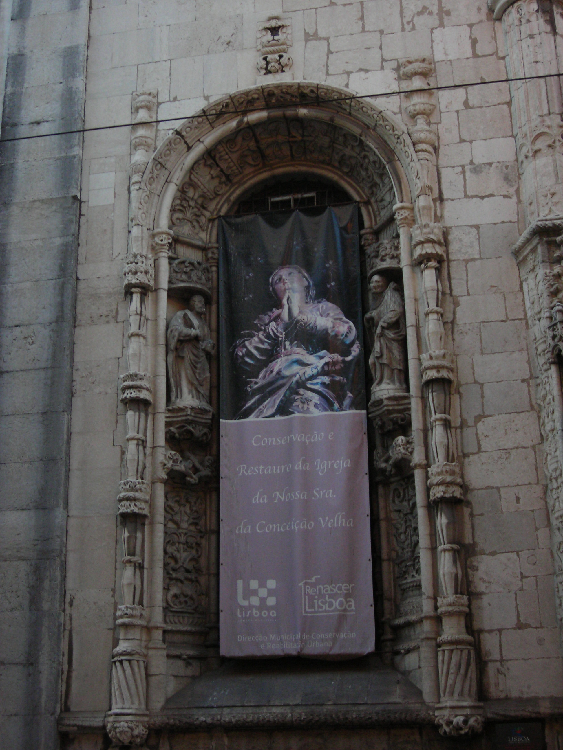 Igreja de Nossa Senhora da Conceição Velha